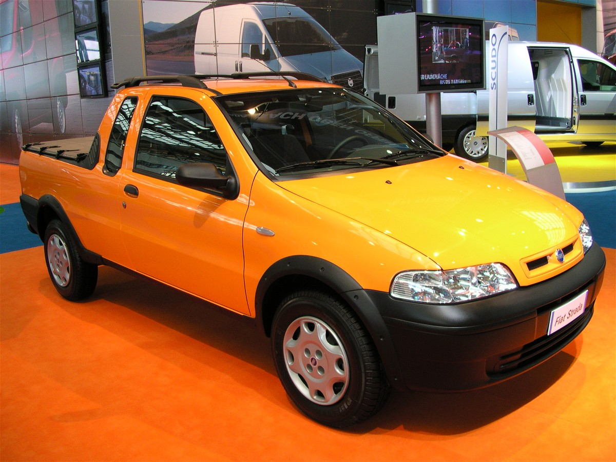 Fiat Strada Pickup bei der IAA für Nutzfahrzeuge 2004 in Hannover